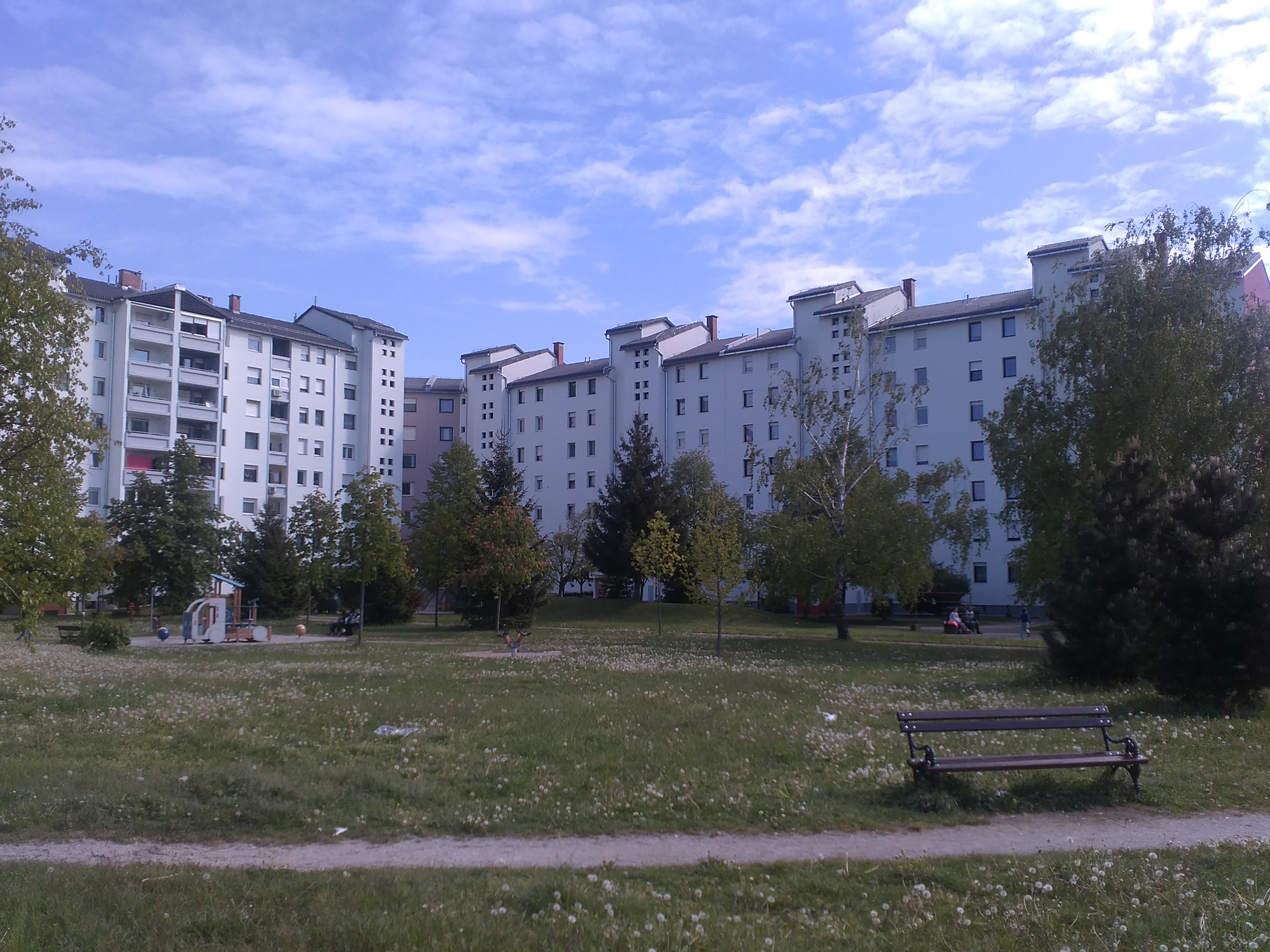 Stanovanjski bloki ob Cesti proletarskih brigad